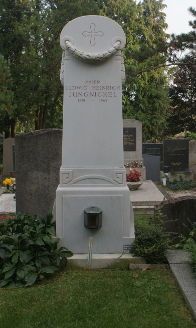 Ludwig Jungnickekl-Kalksburger Friedhof (12-33)